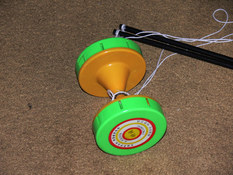 空竹。